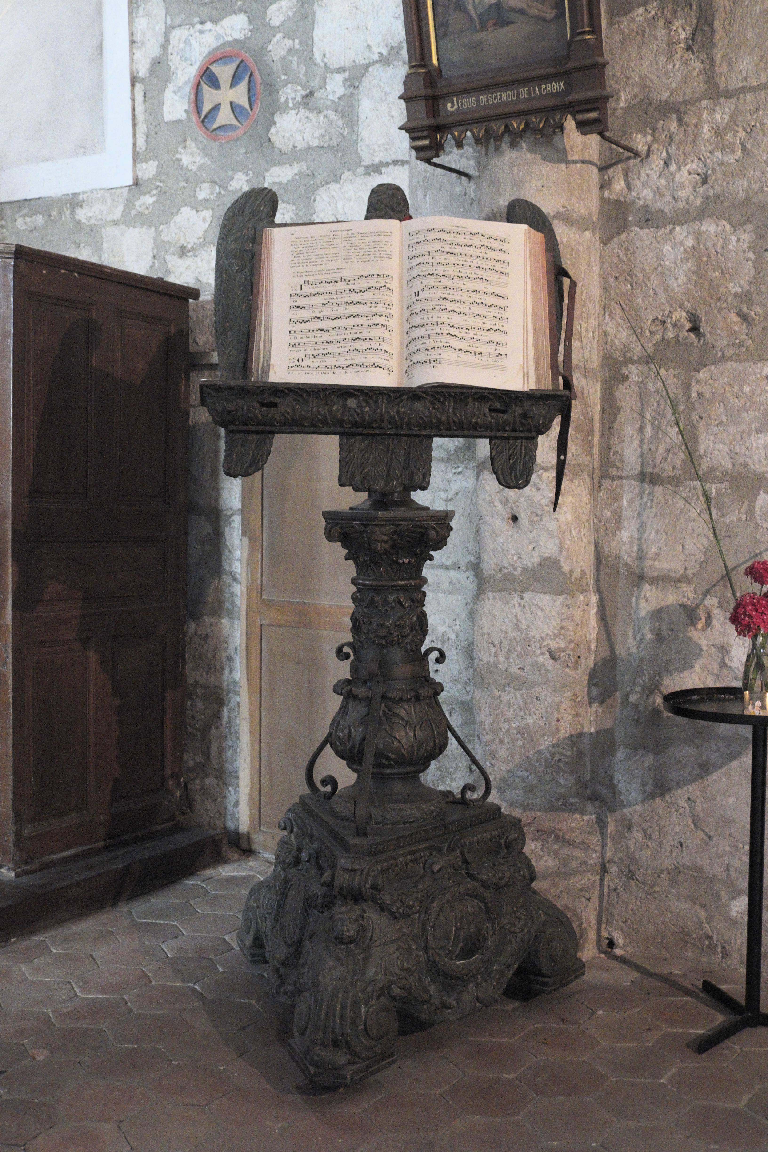 Katholische Kirche Saint-Pierre-Saint-Eutrope in Angerville im Département Essonne (Île-de-France/Frankreich), Adlerpult von 1688